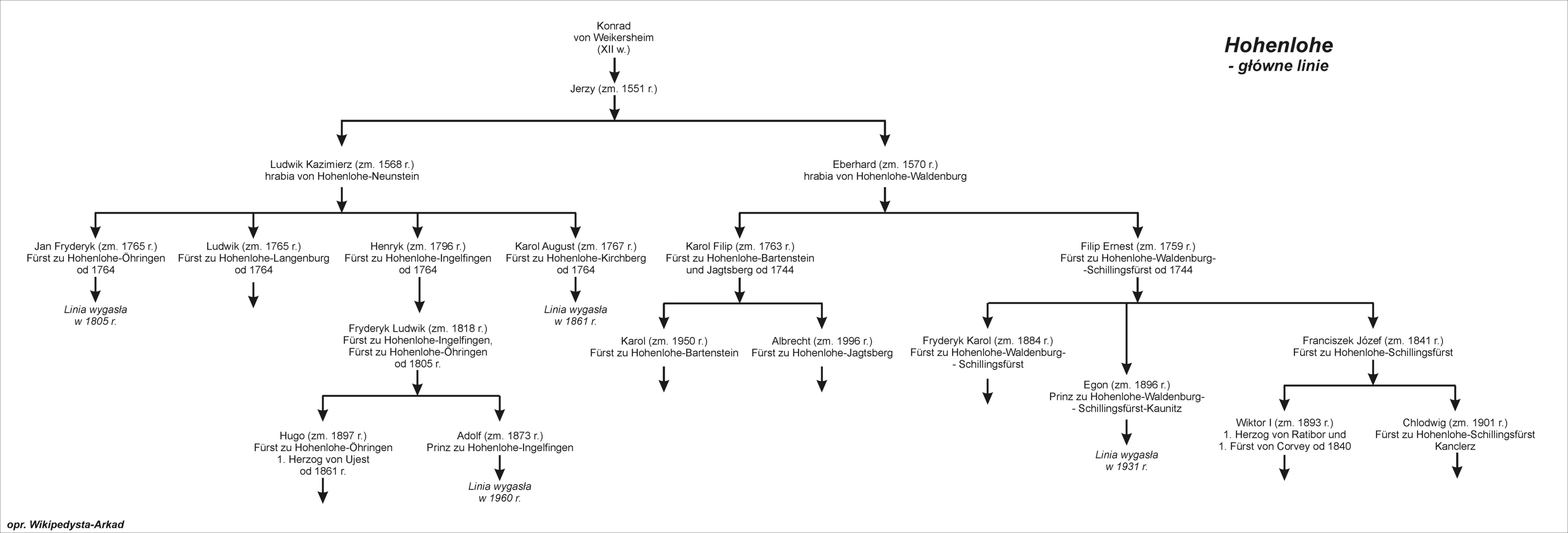 Główne linie rodu von Hohenlohe